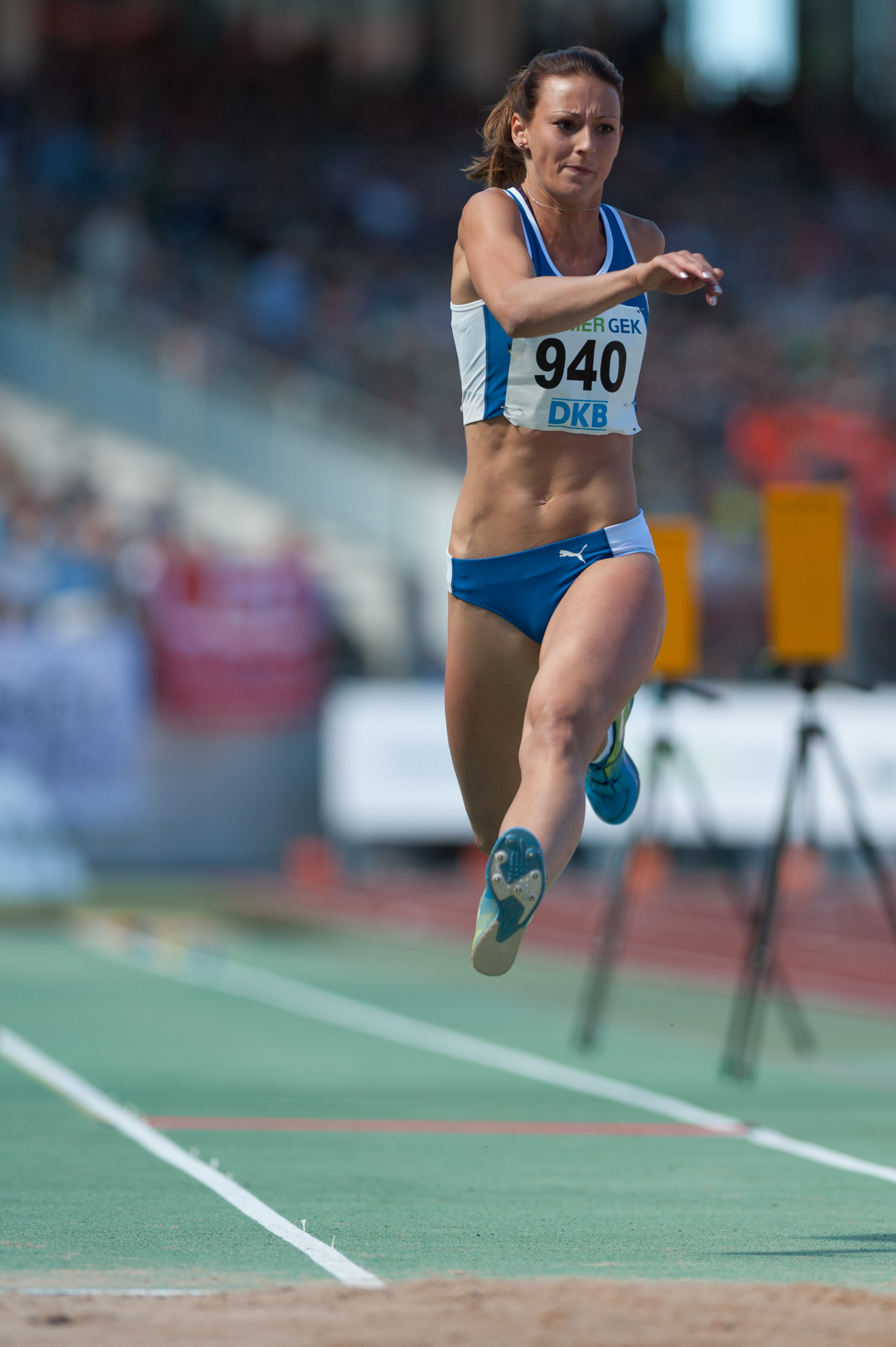 Deutsche Leichtathletik-Meisterschaften 2015: Frauen Dreisprung - Kristin Gierisch, LAC Erdgas Chemnitz